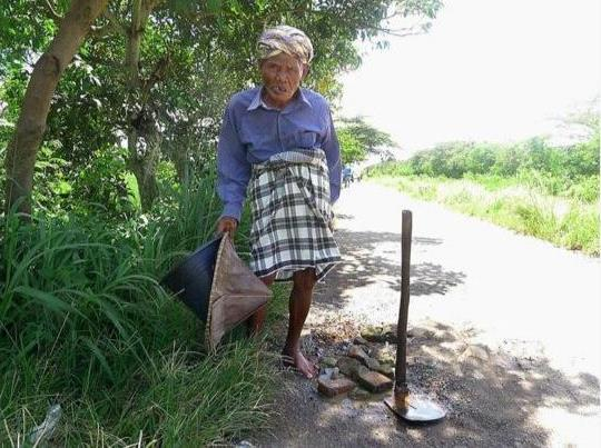 Jawa: Foto kagiyatanipun Asmani nalika nambal mergi